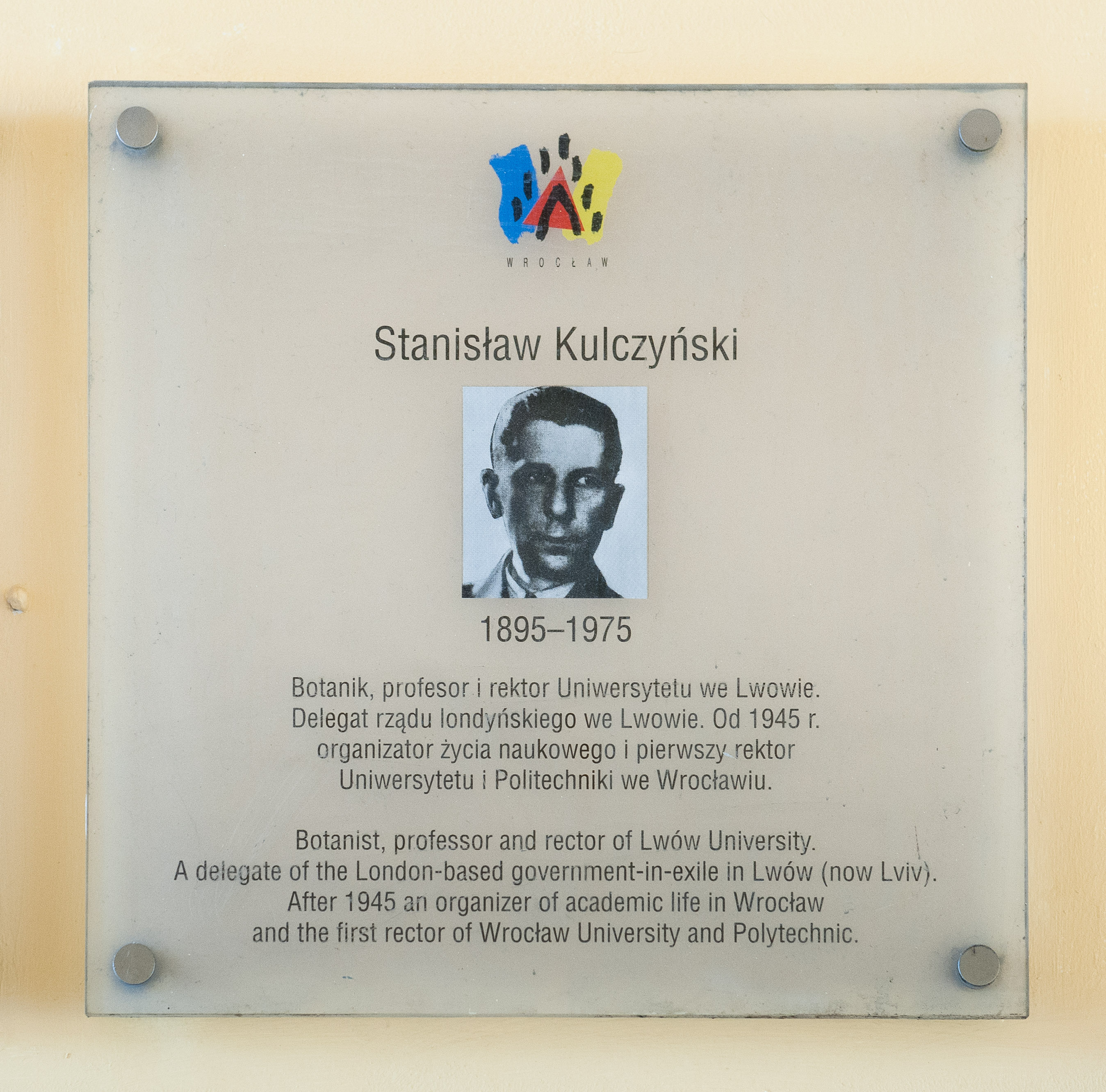 Tablica pamiątkowa Stanisława Kulczyńskiego na budynku Uniwersytetu Wrocławskiego.